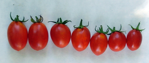 Morfologia di frutti del pomodorino di Manduria